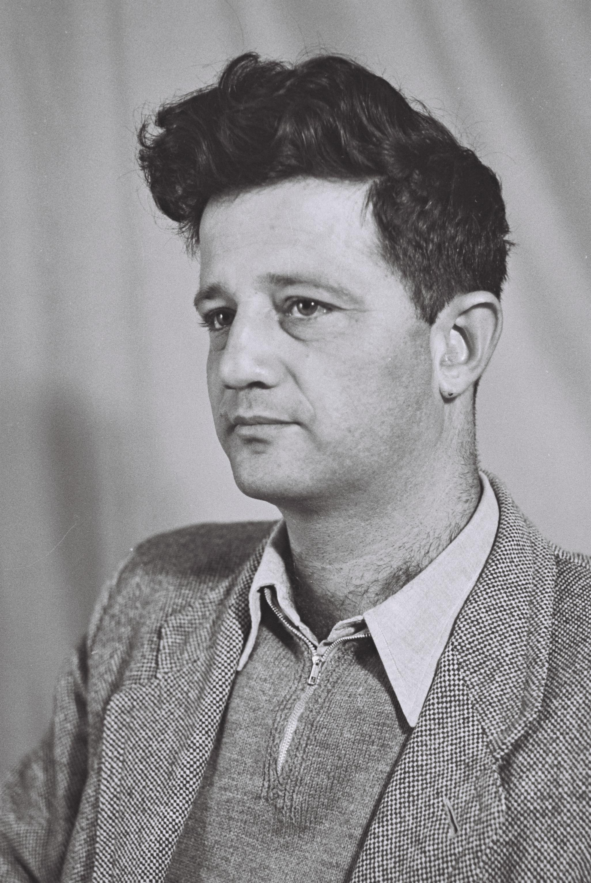 YIZHAR SMILANSKY, MEMBER OF KNESSET, MAPAI PARTY.